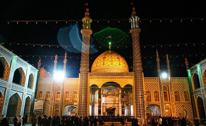 حرم علی ابن امام محمد باقر در شب شهادت امام پنجم شیعیان